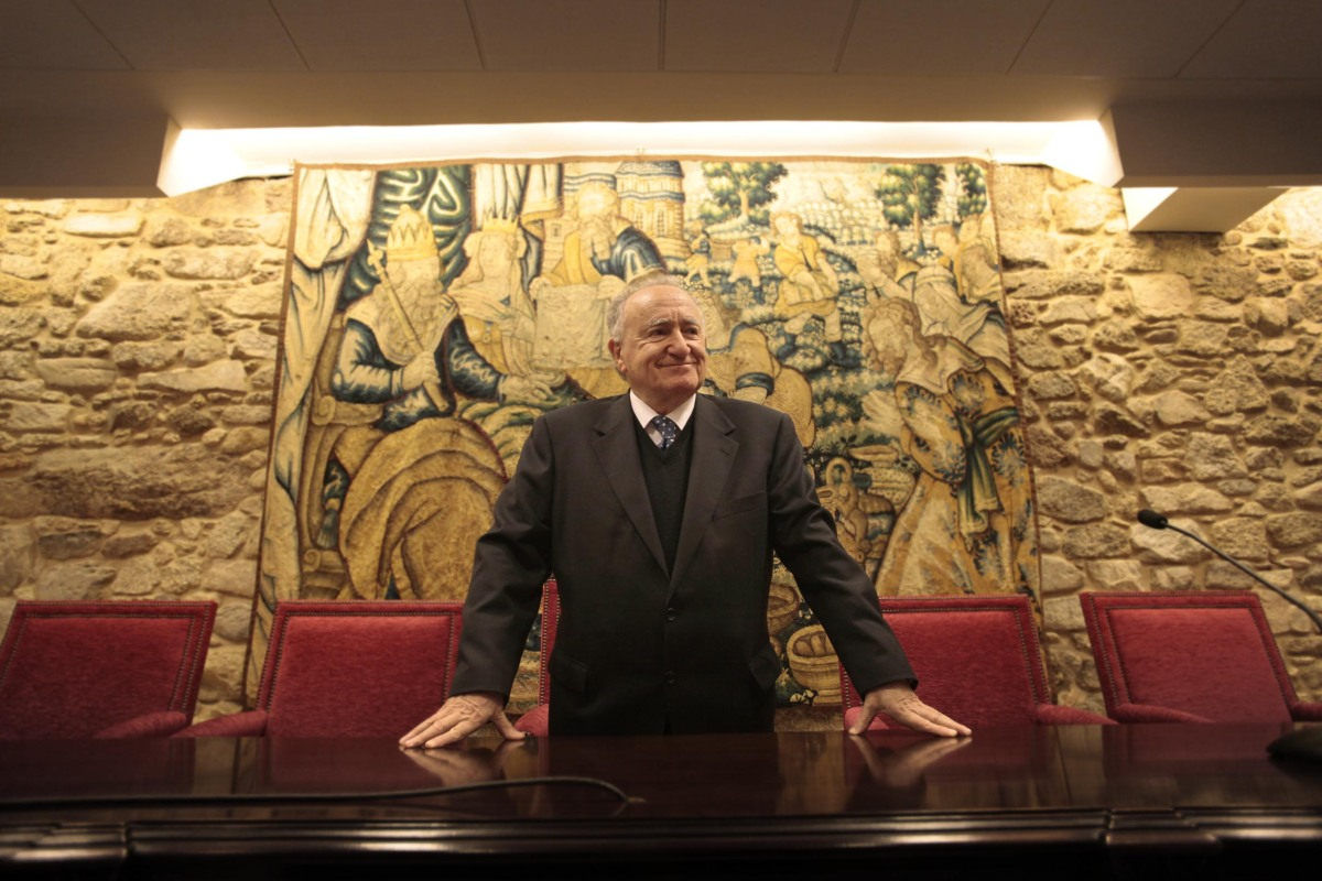 Alonso Montero, tras ser elixido presidente da RAG en abril de 2013.